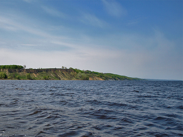 Каневское водохранилище в районе Ржищева